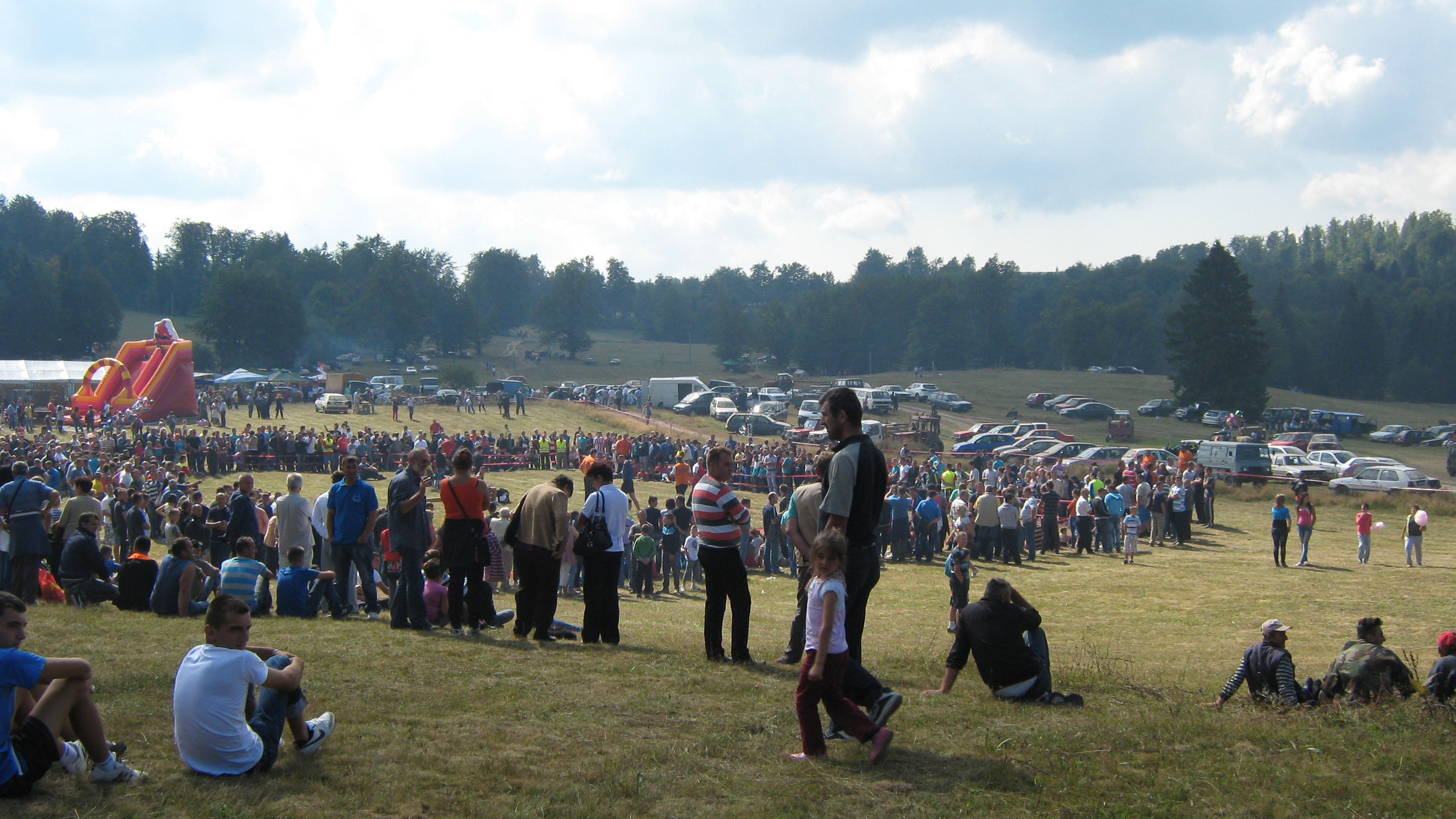 Овновијада 2013. године